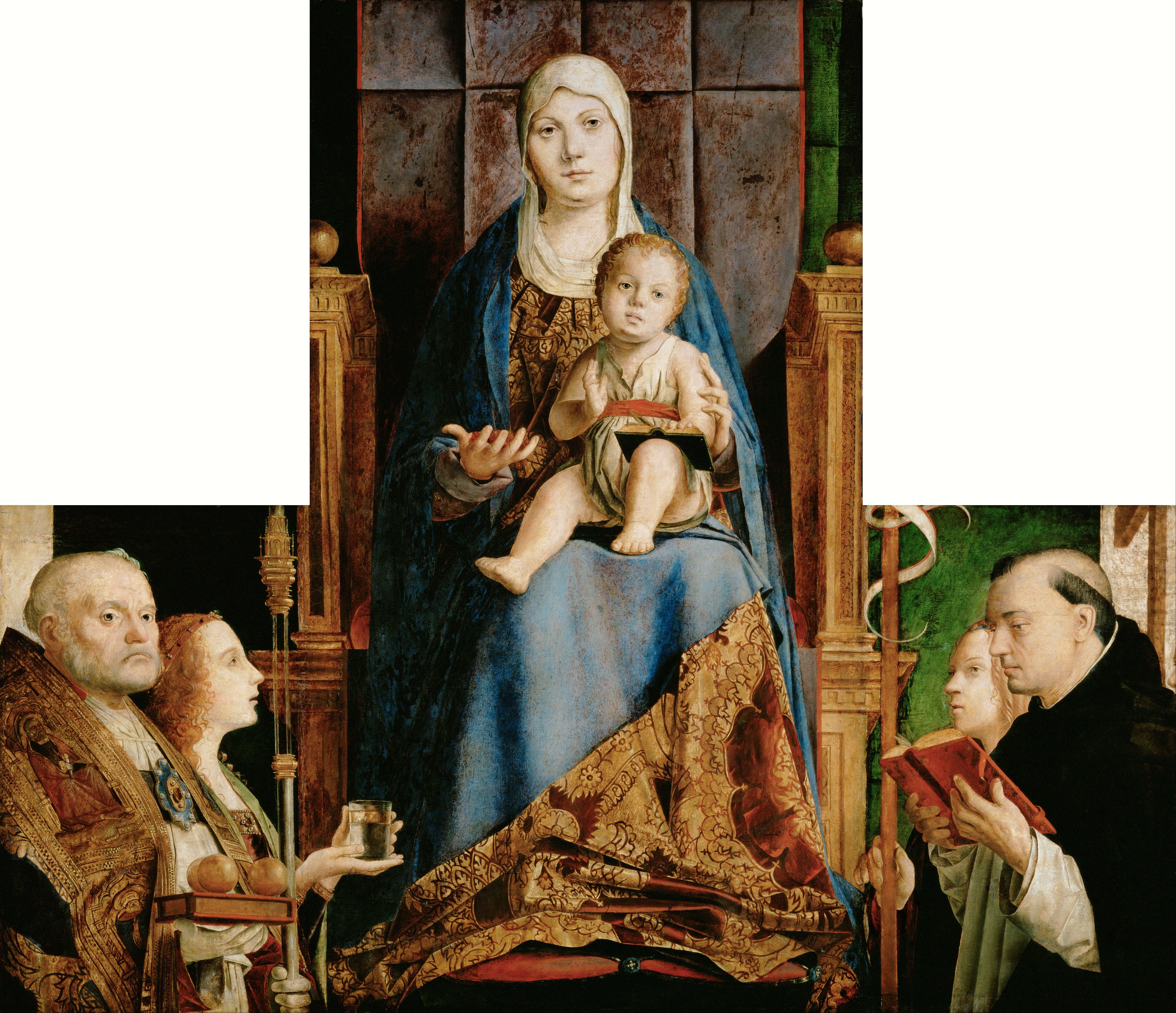 Fragmente der Altartafel mit thronender Madonna und vier Heiligen